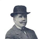 Enrique Villegas Echiburú